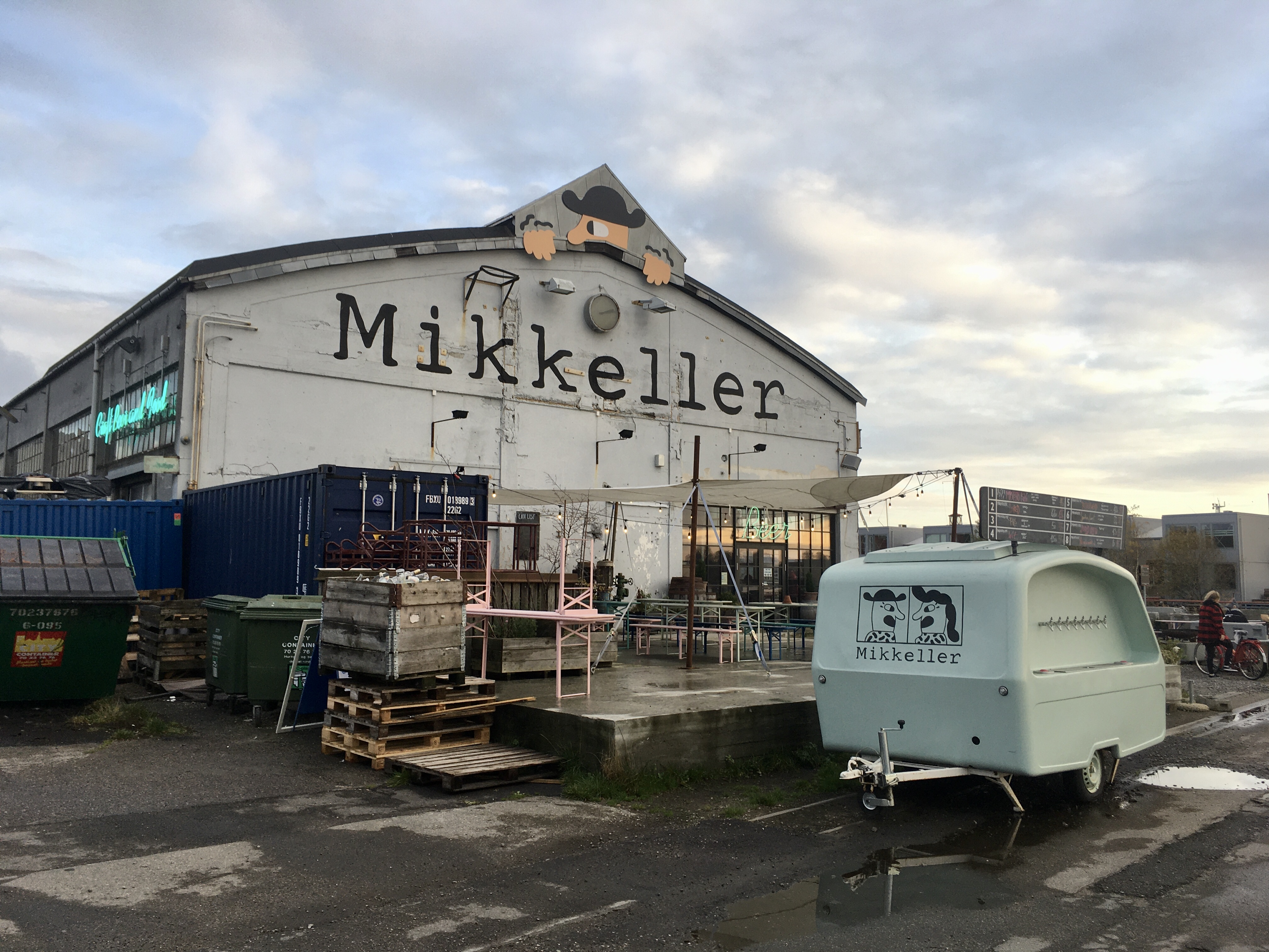 Mikkeller Baghaven, Copenhagen